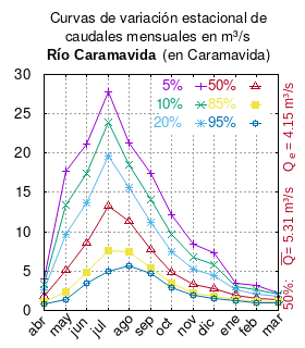 Curvas de variación estacional del río Caramavida en Caramavida. # Dirección General de Aguas # Diagnóstico y clasificación de los cursos y cuerpos de agua según objetivos de calidad. Cuenca del río Paicaví. # Santiago de Chile # Ministerio de Obras Públicas (Chile) # 2004 # url: # urlarchivo: # Tabla 4.1: Río Caramavida en Caramavida (m3/s), pág. 24 mes 5% 10% 20% 50% 85% 95% abr 3.989 3.335 2.685 1.774 1.065 0.789 may 17.651 13.429 9.639 5.103 2.316 1.446 jun 21.218 17.365 13.623 8.563 4.834 3.456 jul 27.831 23.863 19.680 13.259 7.535 5.015 ago 21.338 18.567 15.679 11.316 7.441 5.682 sep 17.357 14.158 11.245 7.681 5.417 4.688 oct 12.109 9.629 7.445 4.904 3.408 2.960 nov 8.380 6.715 5.209 3.387 2.247 1.886 dic 7.297 5.755 4.386 2.777 1.813 1.519 ene 3.447 3.047 2.629 1.999 1.439 1.185 feb 3.115 2.601 2.124 1.524 1.127 0.994 mar 2.279 2.059 1.820 1.438 1.076 0.908 This plot was created with Gnuplot.